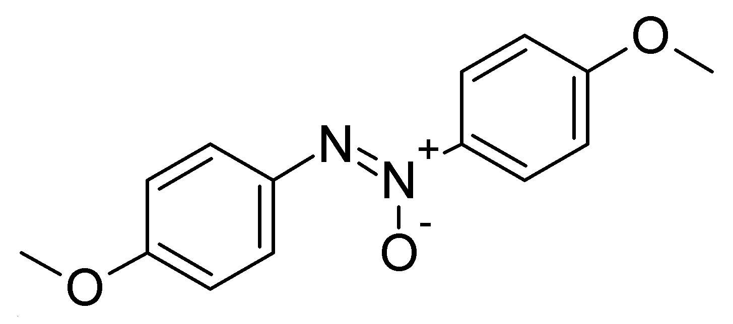 I made it